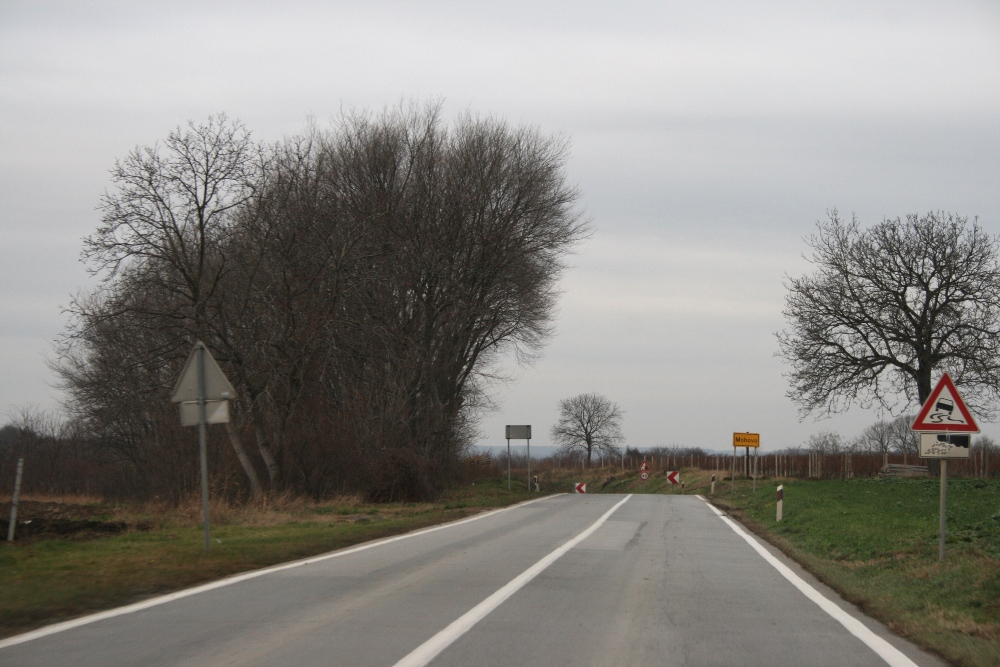 Ulaz u mjesto Mohovo